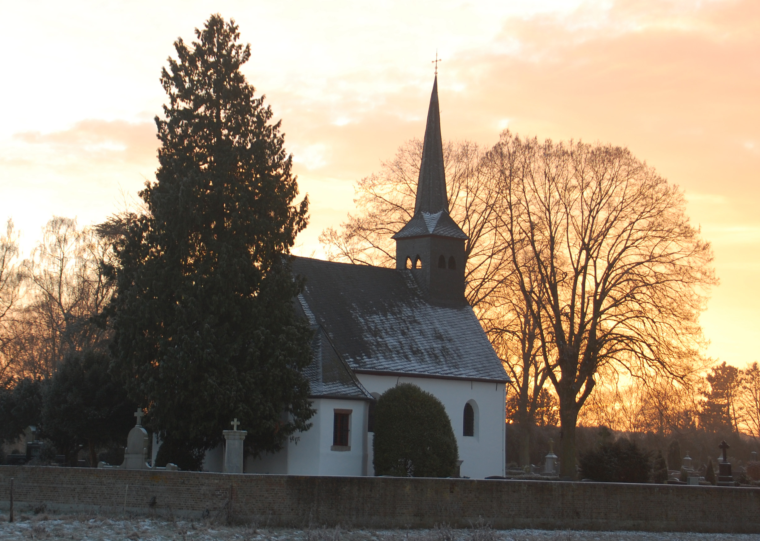 Friedhofskapelle Heddinghoven, Lechenich